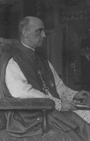 Zikmund Václav hrabě Halka-Ledóchowski (1861 - 1944), Římskokatolický kněz.